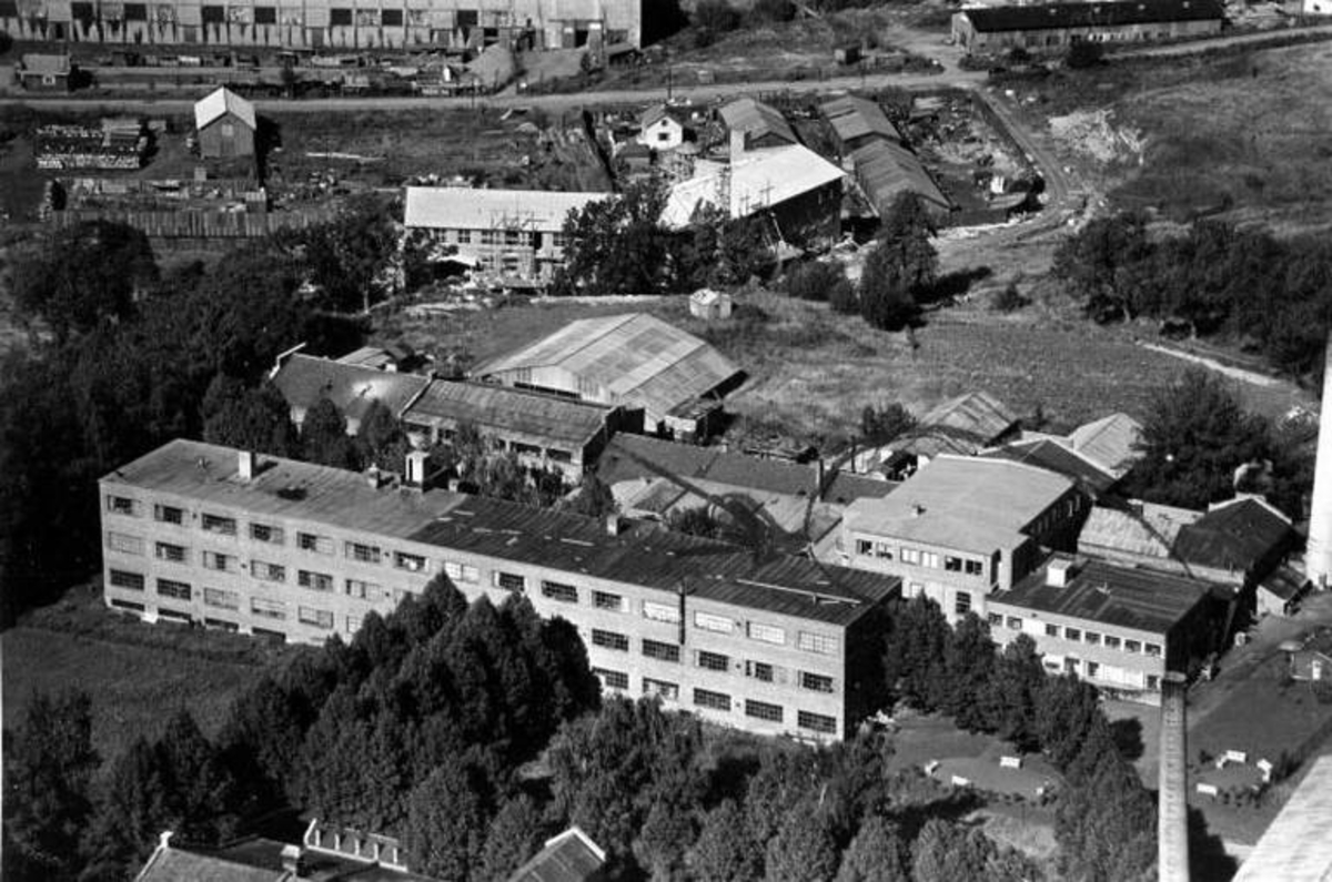 Bredesen & Jørgensen